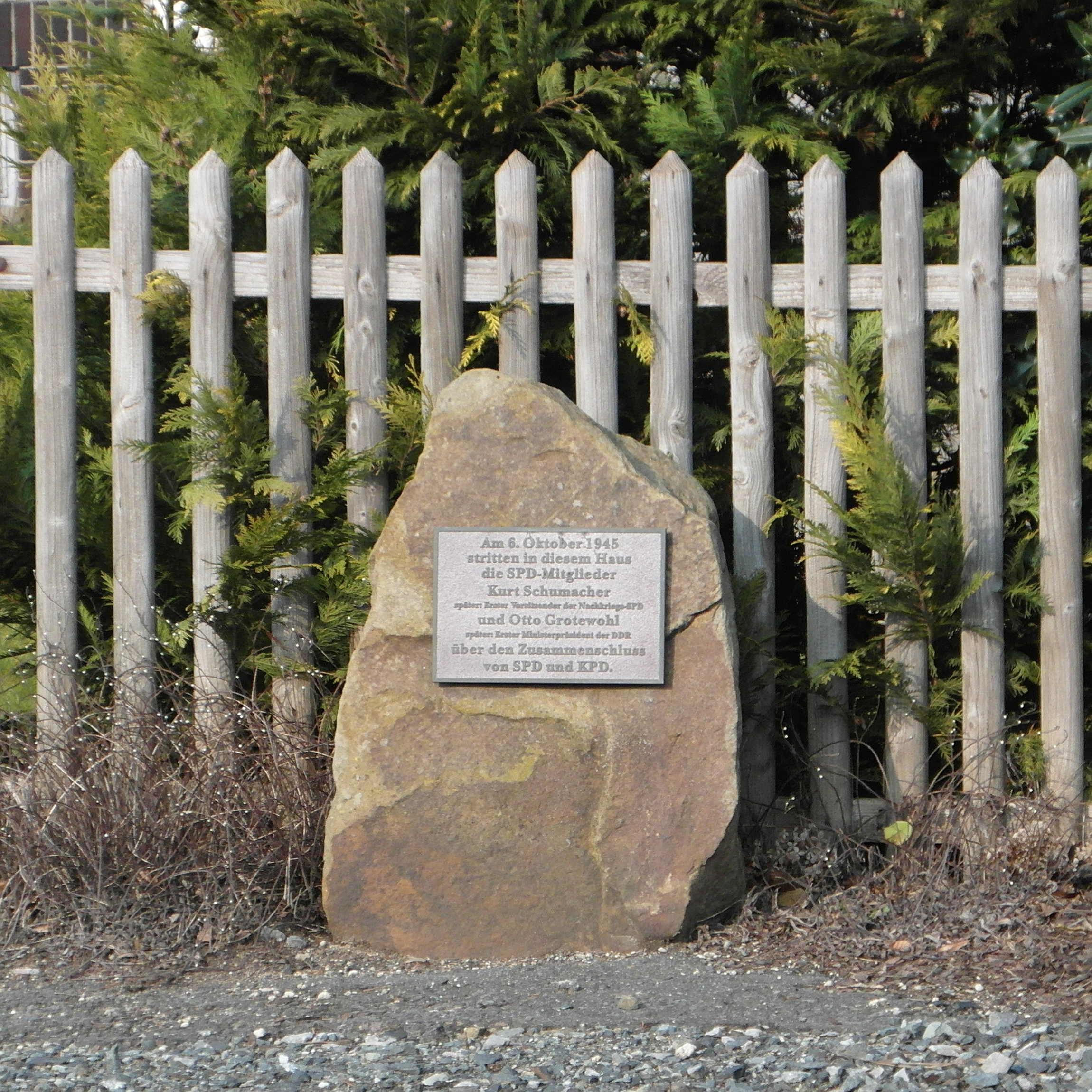 Gedenktafel vor dem Haus Egestorfer Straße 12 im Ortsteil Wennigser Mark der Gemeinde Wennigsen in der Region Hannover. Text: Am 6. Oktober 1945 stritten in diesem Haus die SPD-Mitglieder Kurt Schumacher später: Erster Vorsitzender der Nachkriegs-SPD und Otto Grotewohl später: Erster Ministerpräsident der DDR über den Zusammenschluss von SPD und KPD. Die im Jahr 2000 auf einem Findling angebrachte Tafel beschreibt ein Ereignis am Rande der Wennigser Konferenz zwischen Kurt Schumacher und dem in diesem Haus untergebrachten Otto Grotewohl in der Nacht zum 7. Oktober 1945.